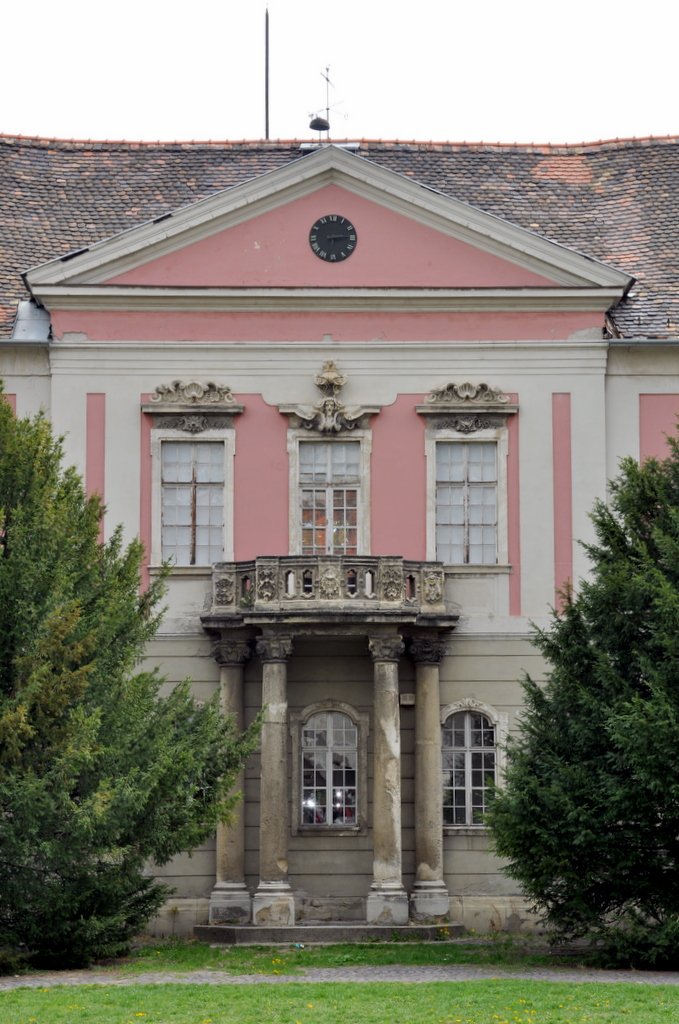 Zichy Palace, Óbuda, Budapest, Hungary